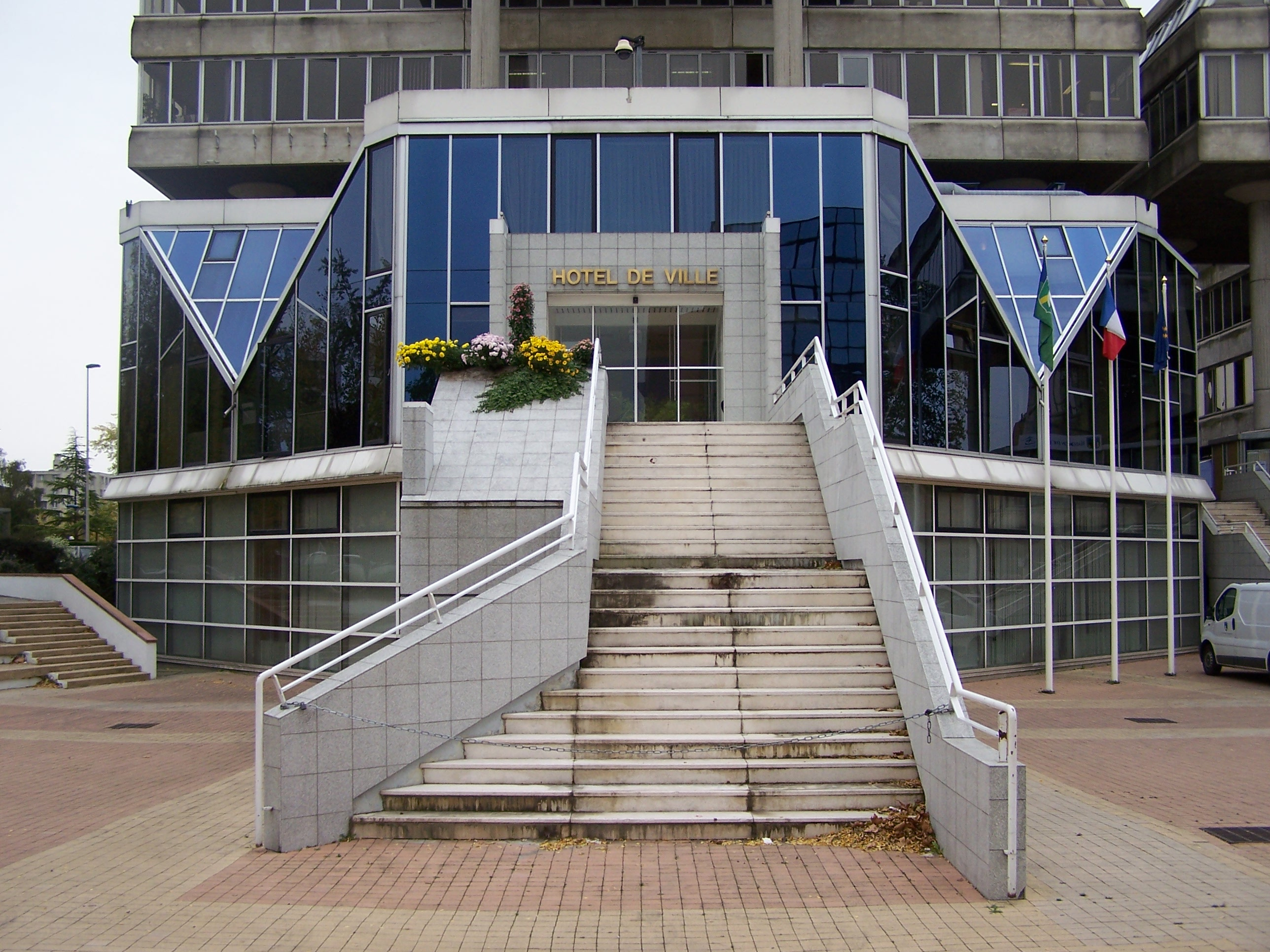 Mairie d'Élancourt (Yvelines, (France)